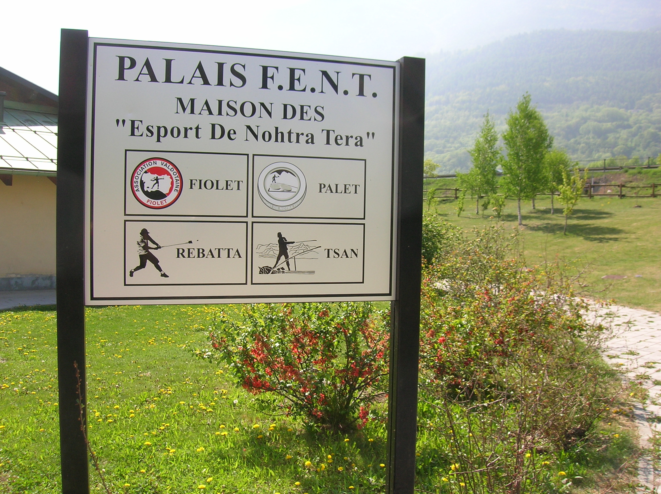 Cartello Palais F.E.N.T. Area verde regionale "Esport de notra tera" in località Les Iles, Brissogne, Valle d'Aosta, Italia.